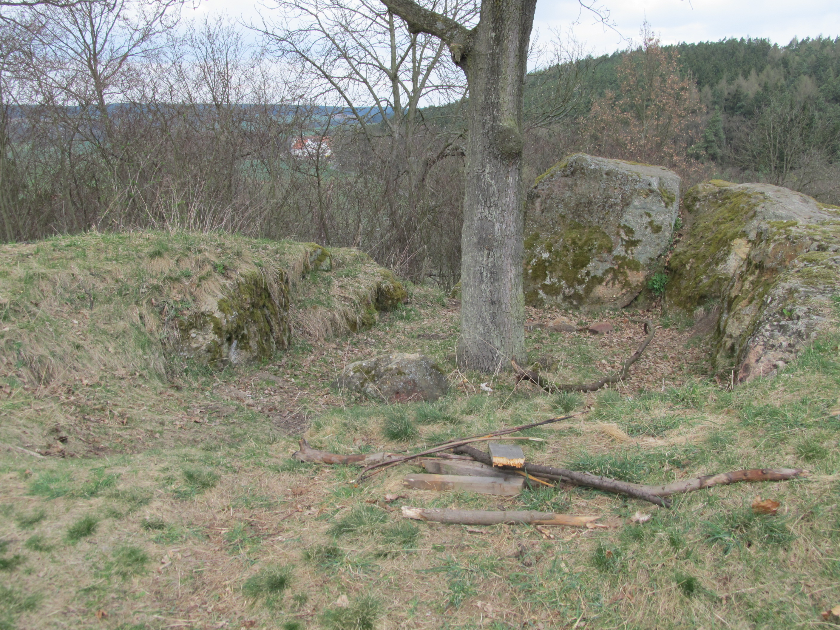 Komberk - hradisko